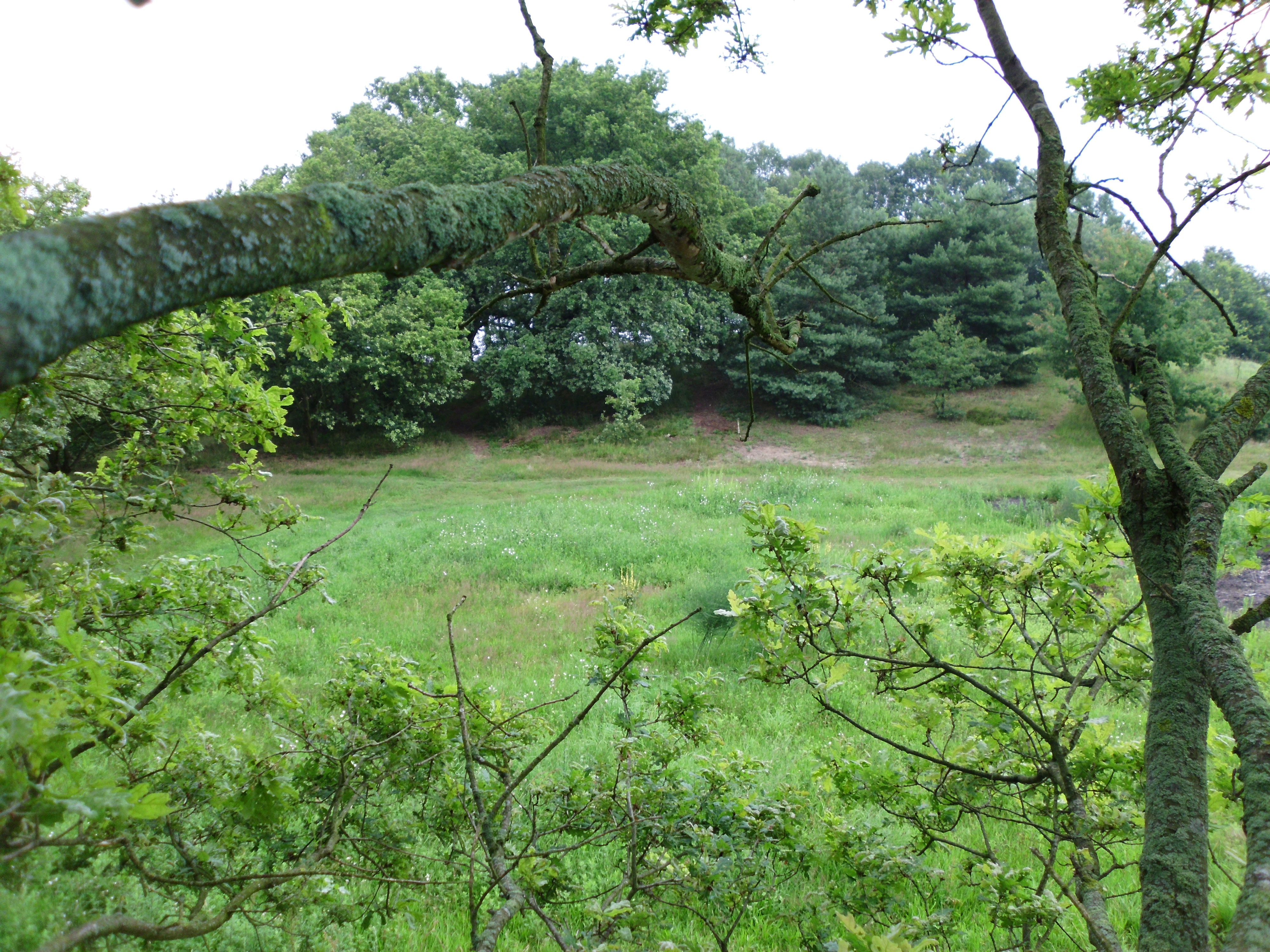 Der Gallaberg aus der Westlicher Perspektive.